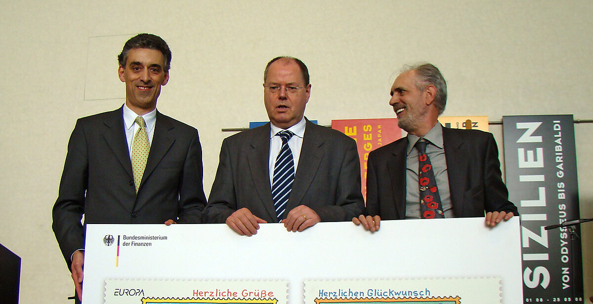 Übergabe von neu verausgabten Briefmarken in der Bundeskunsthalle in Bonn am 9. Mai 2008 vom Herausgeber, Finanzminister Peer Steinbrück (Mitte), an die Deutsche Post, vertreten durch den Vorstandsvorsitzenden Frank Appel (links). Rechts der entwerfende Künstler: James Rizzi.